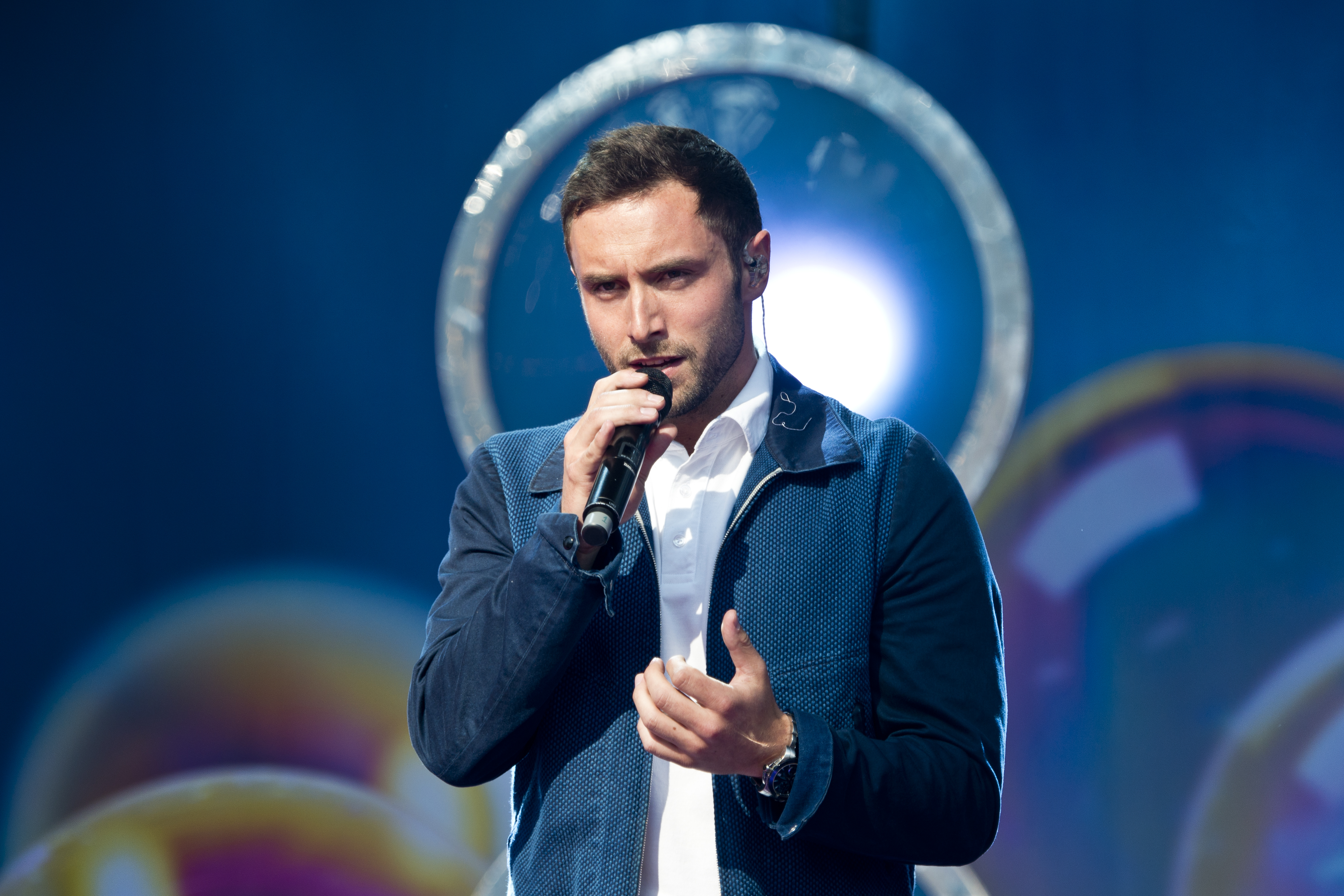 Måns Zelmerlöw uppträder på Sommarkrysset 2015